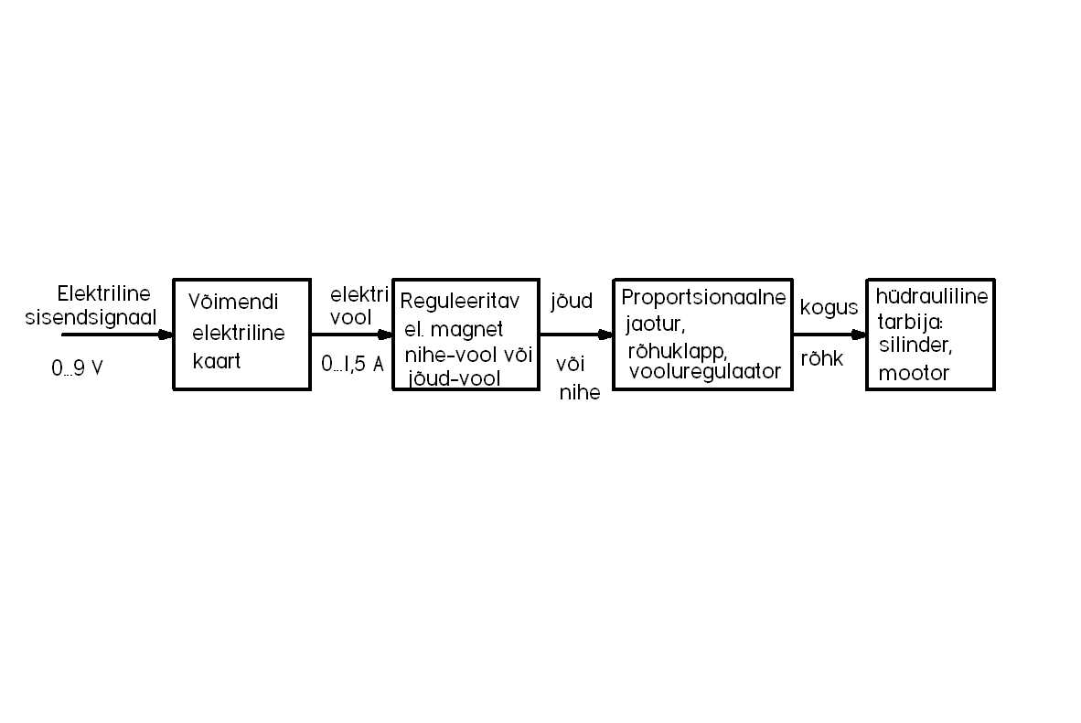 Hüdroajami proportsionaaljuhtimise skeem